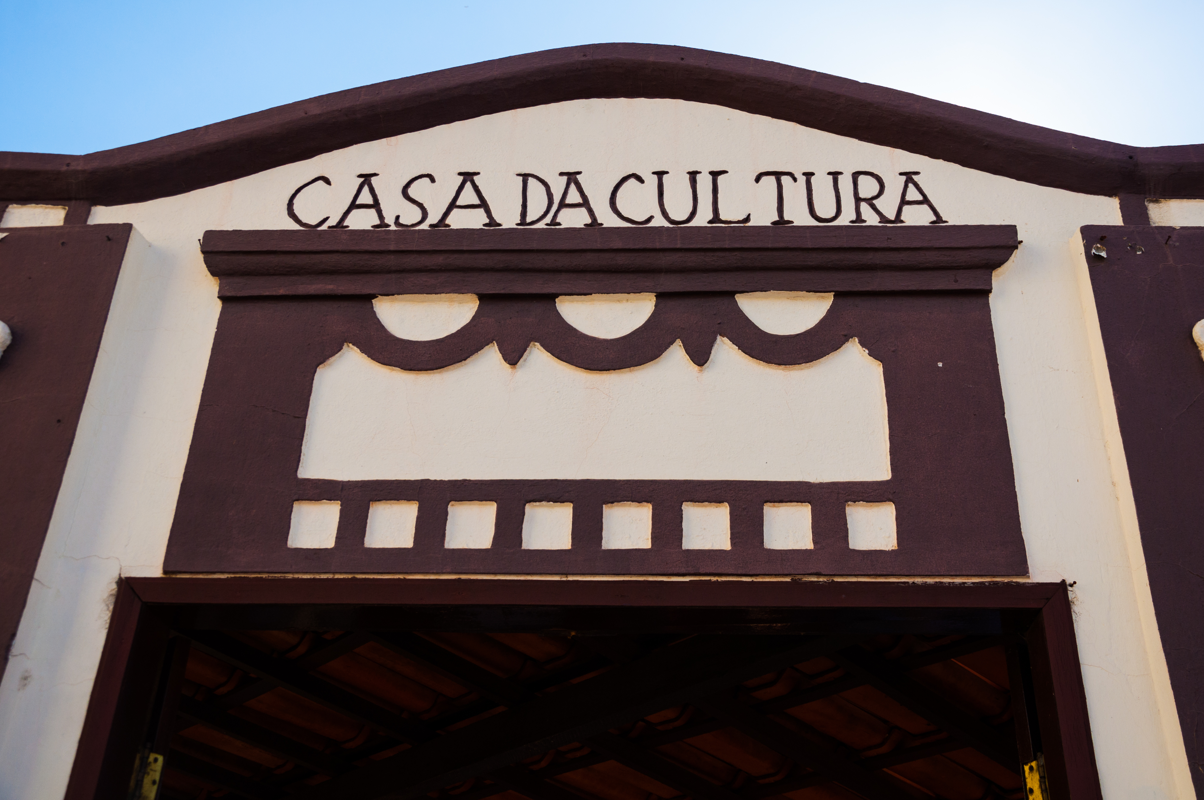 Fachada da Casa de Cultura de Serra Talhada - PE